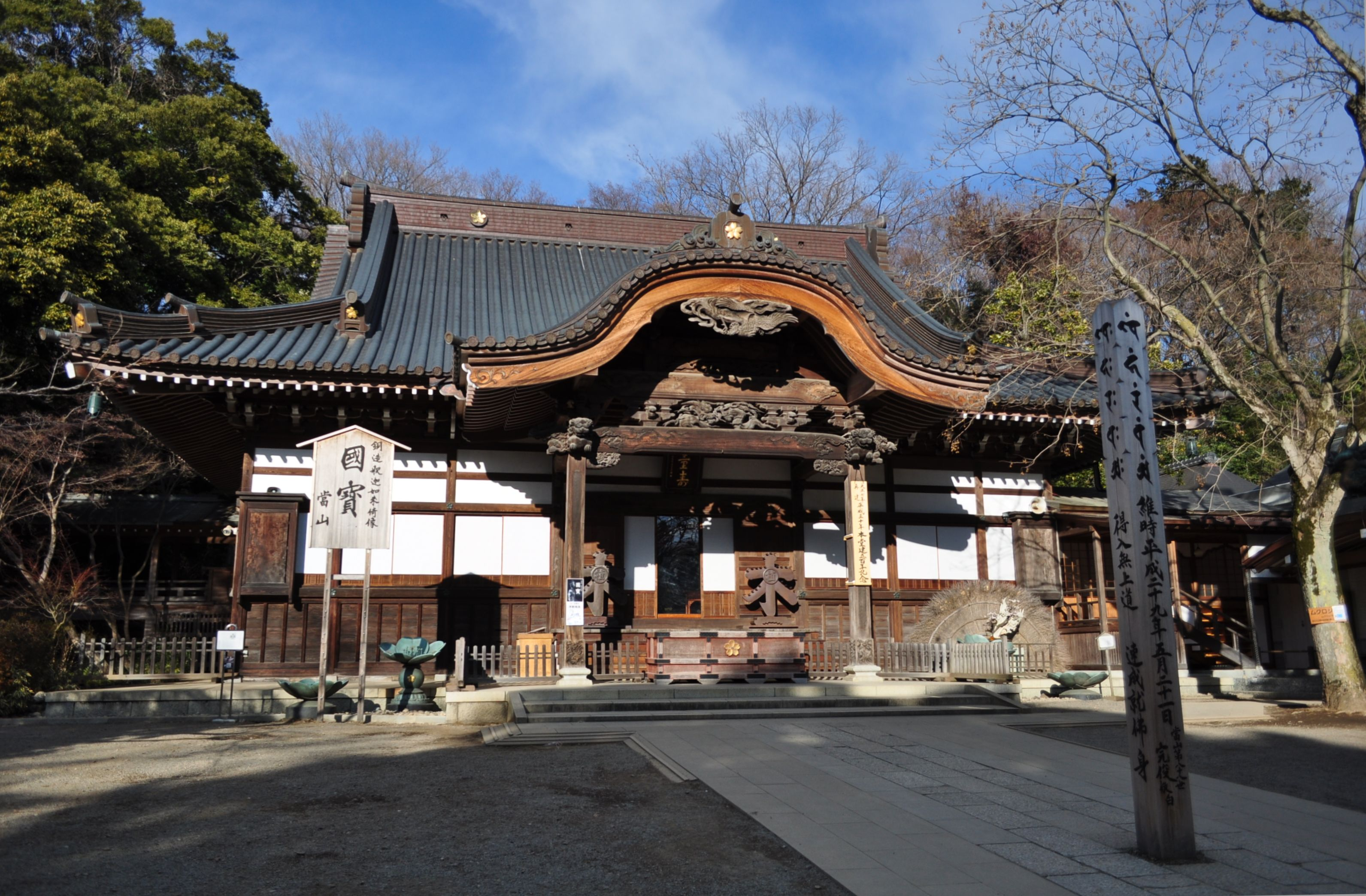 調布市 深大寺